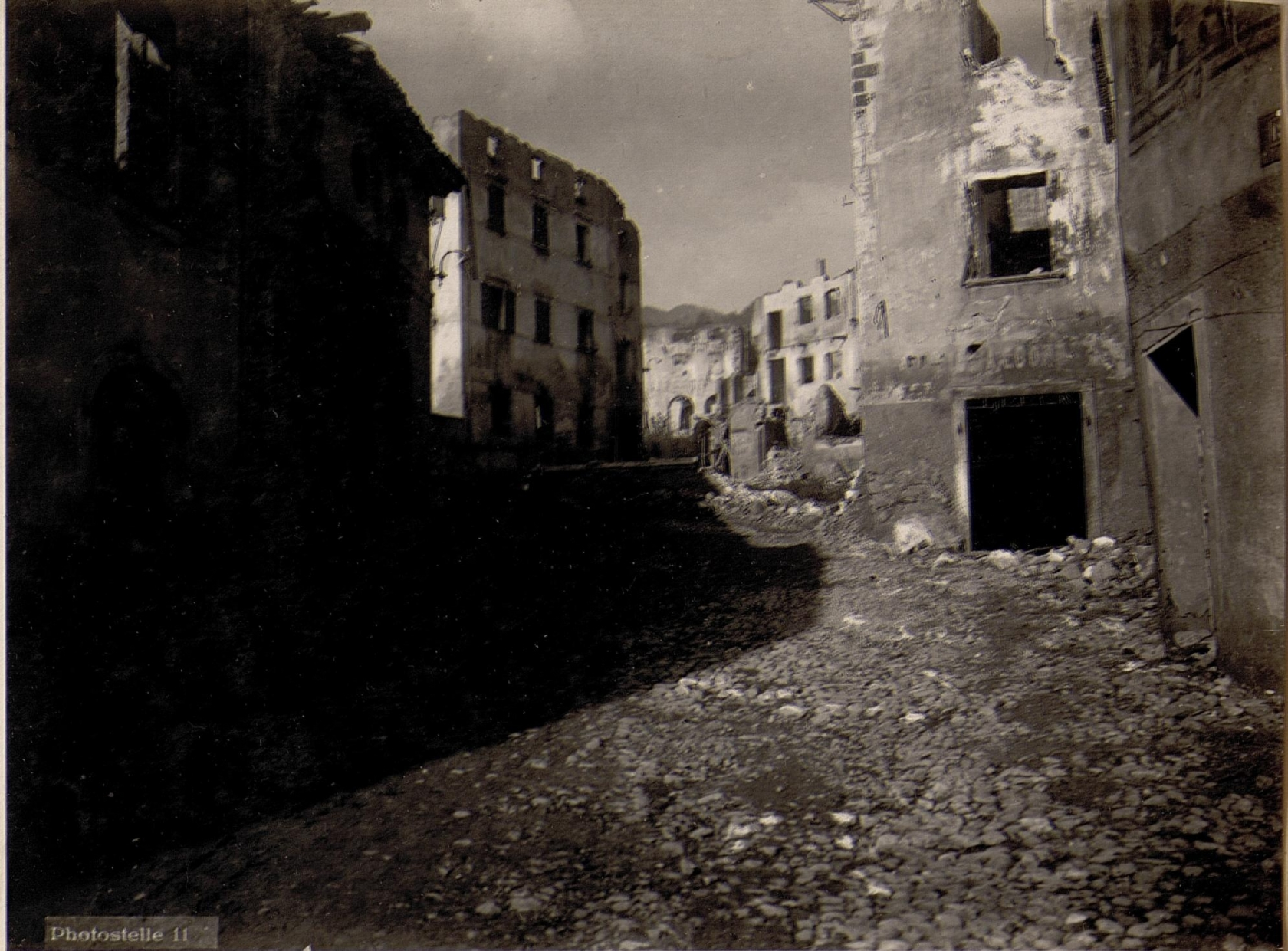 Strigno Valsugana. Straßenbild.